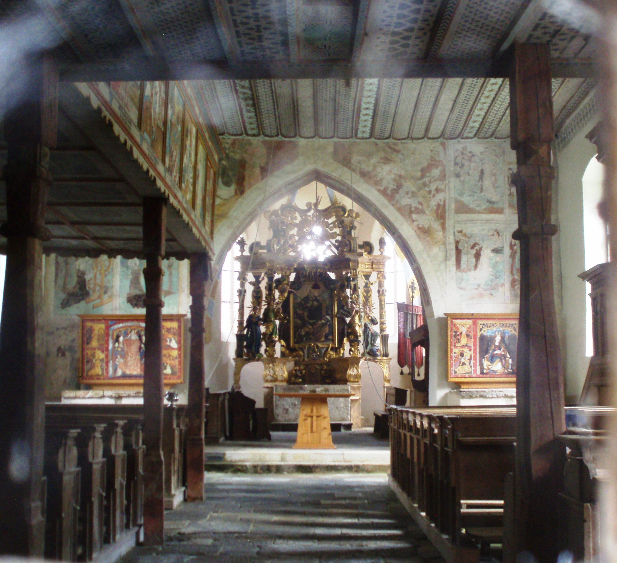 Kath. Filialkirche hl. Cäcilia